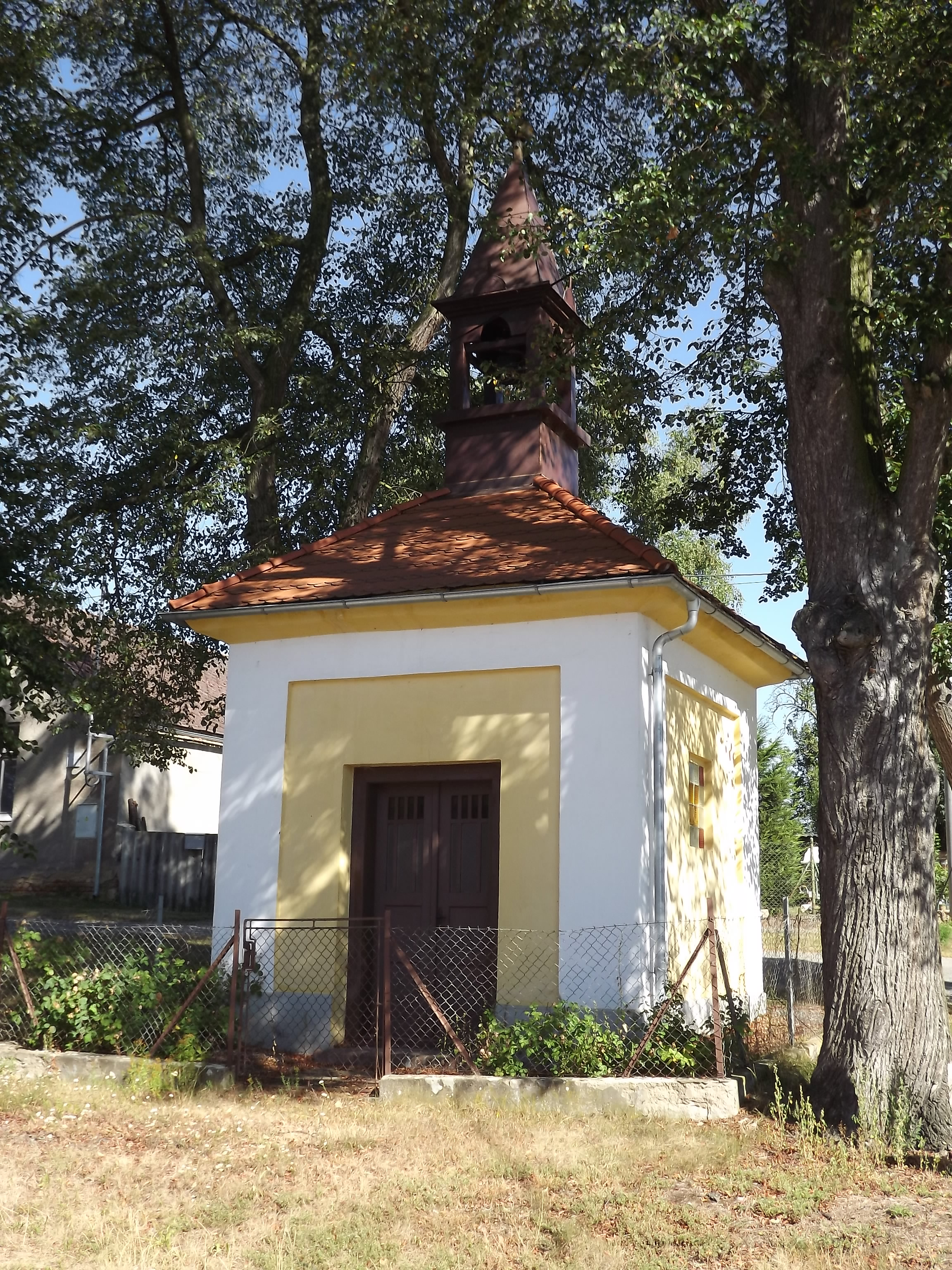 kaple